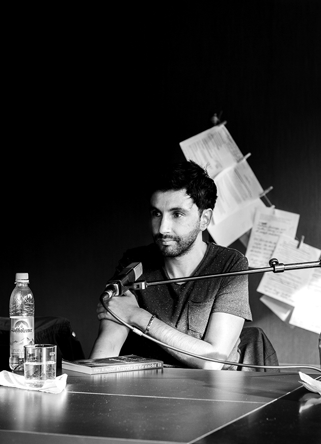 Fikry El Azzouzi las am 3.September im Rahmen des Platzhirschfestivals, in Duisburg im Hotel Niteroom aus seinem Roman “Wir da draussen“ . ("Drarrie in de nacht" )